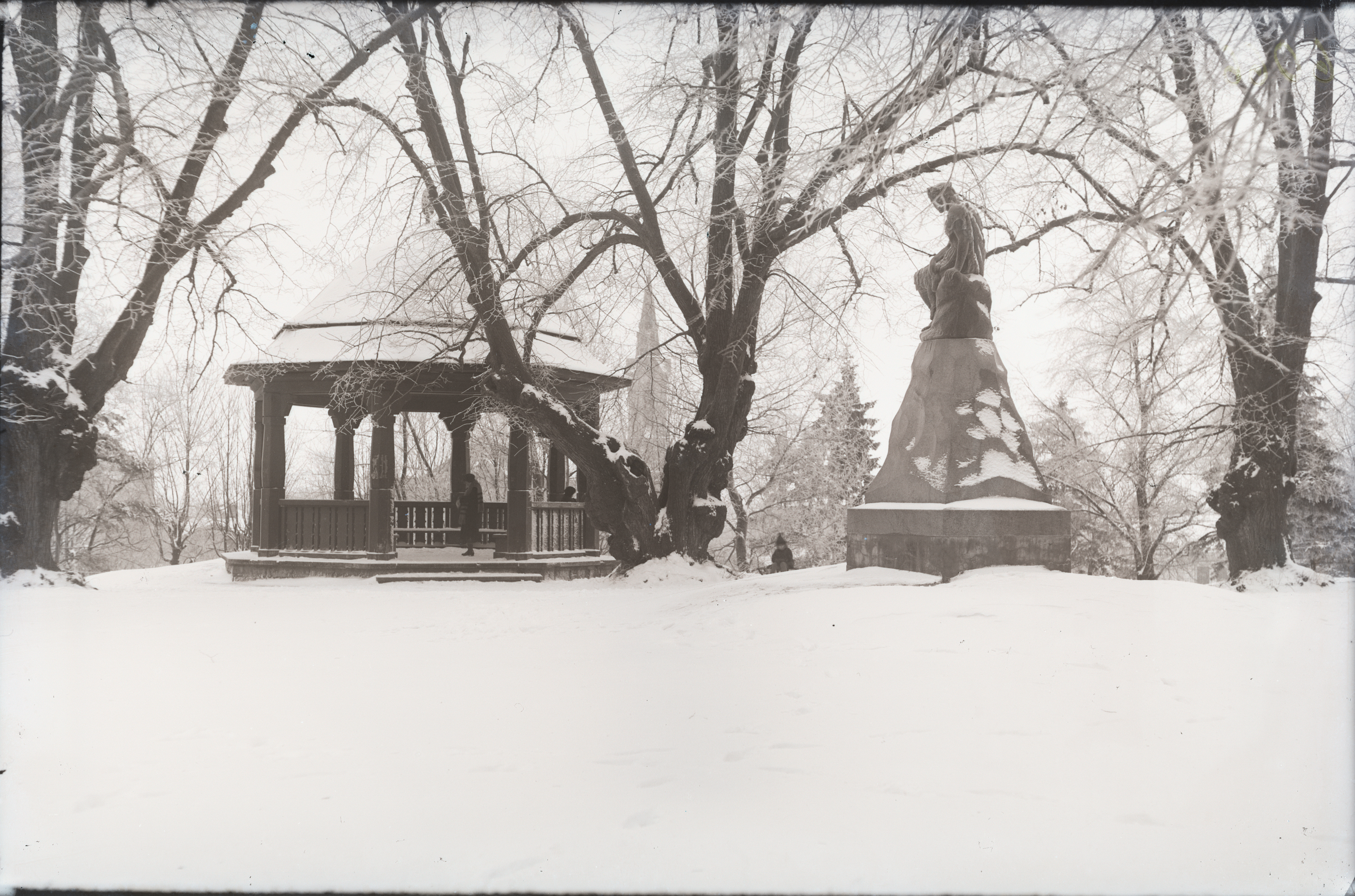 Tallinn, Vanalinn, Linda mägi. Paviljon ja skulptuur Linda (skulptor August Weizenberg)